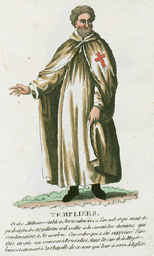 Collection de costumes de tous les ordres monastiques, supprimés à differentes époques, dans la ci-devant Belgique, Bruxelles, Philippe Joseph Maillart et sœur, 1811